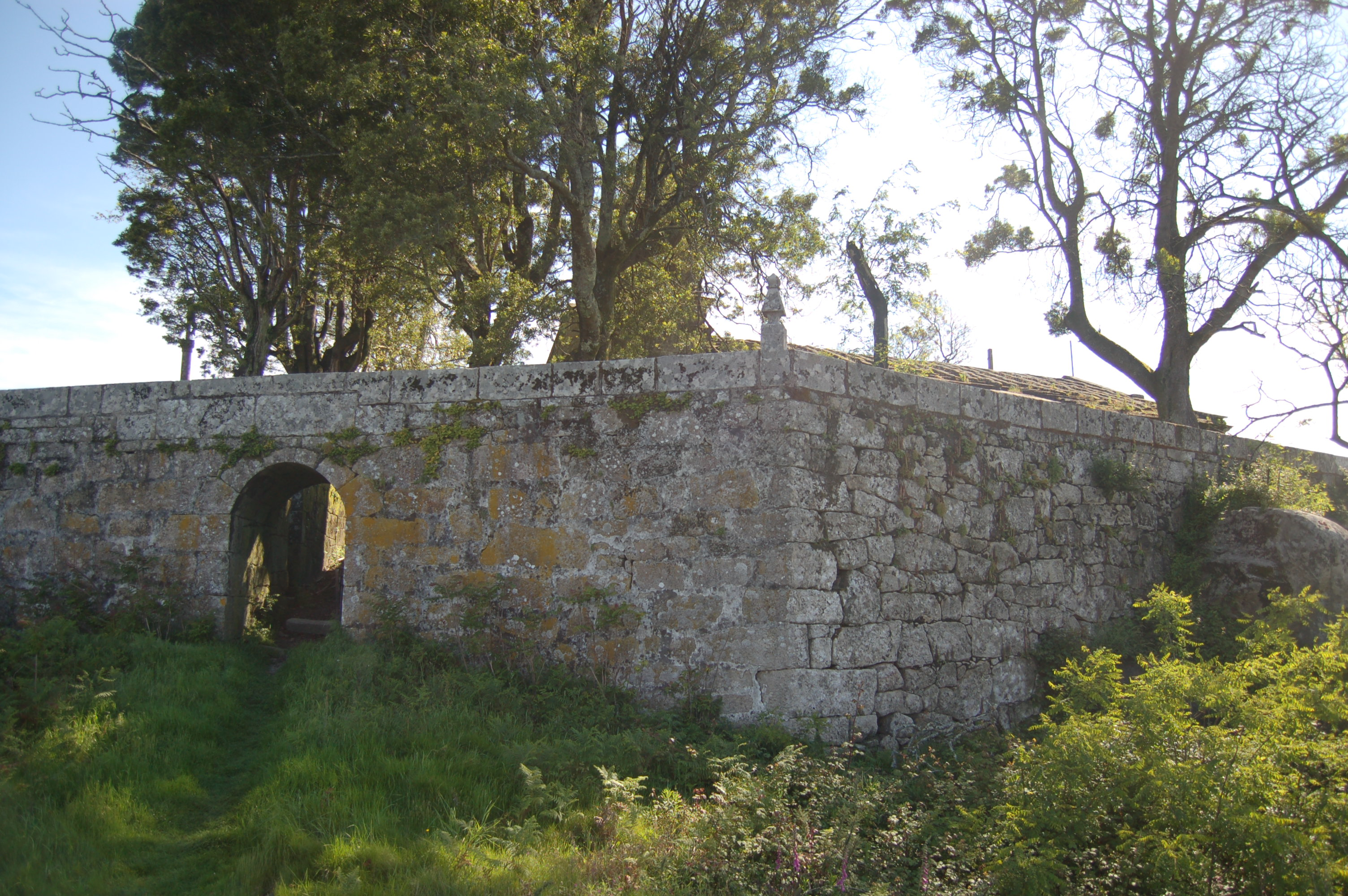 Restos da muralla no Monte da Peneda (O Viso, Redondela) Licenza Categoría:Imaxes do Viso Categoría:Imaxes de murallas de Galicia